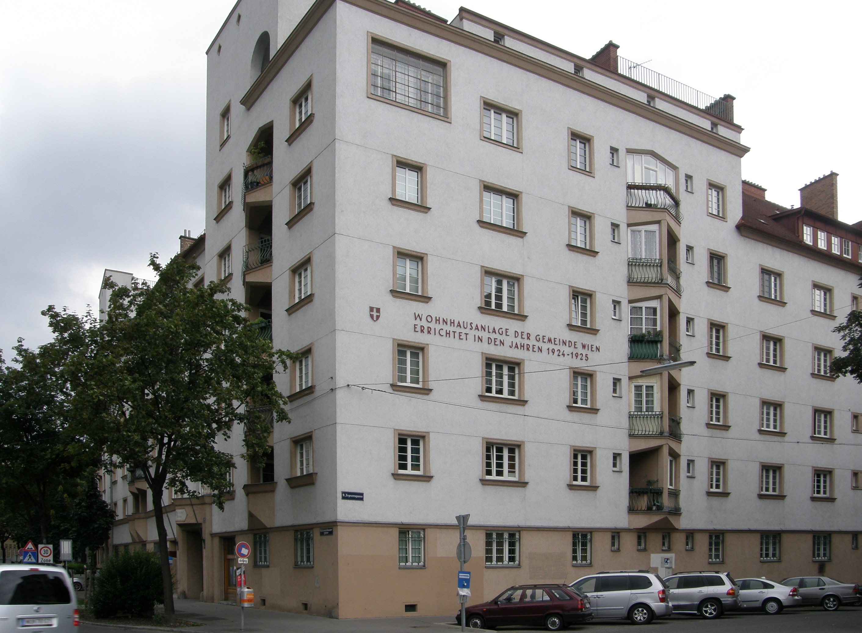 Wien 9, Gussenbauergasse 5-7